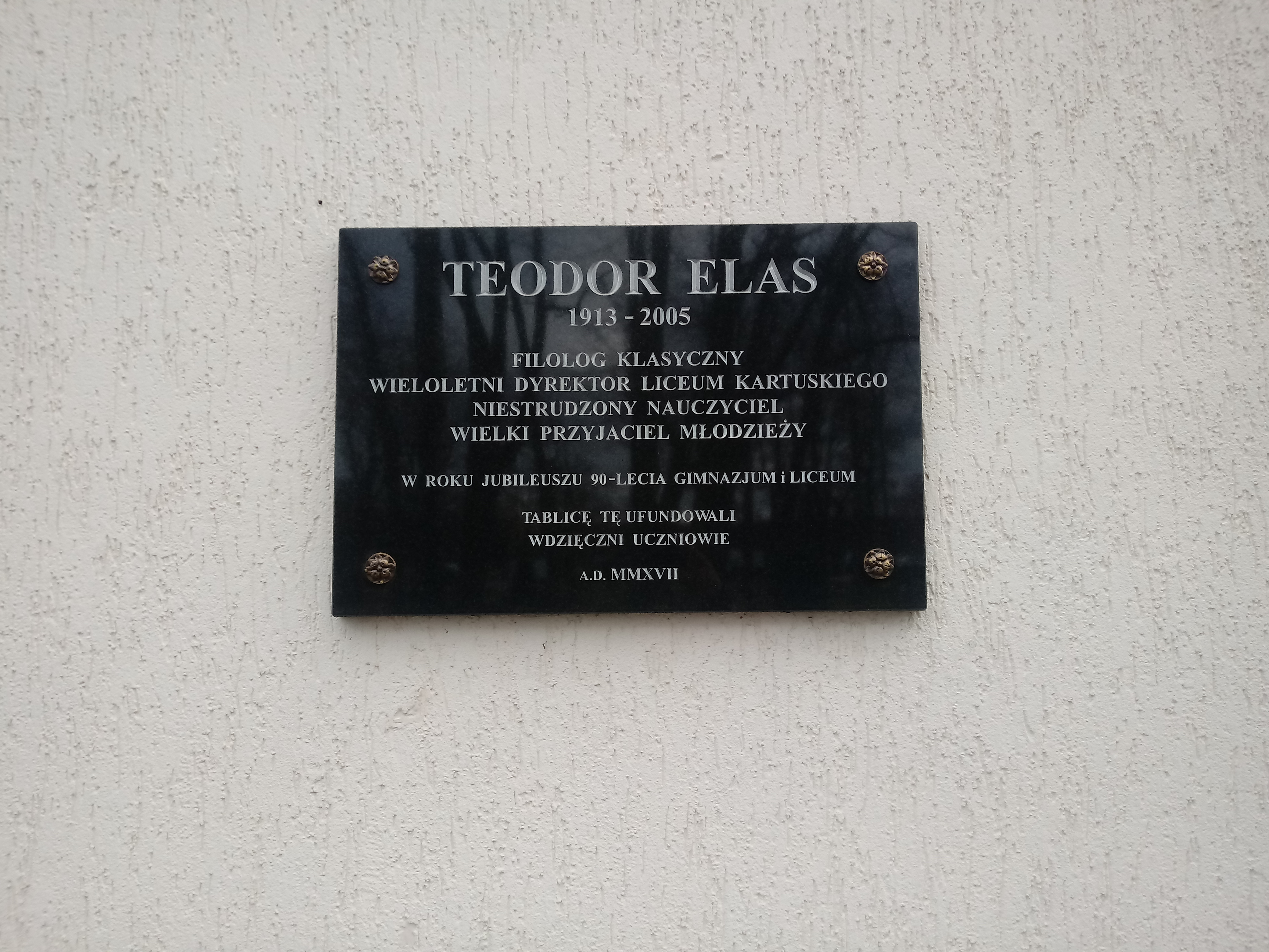 Tablica upamiętniająca prof. T. Elasa znajdująca się na budynku I LO im. H. Derdowskiego